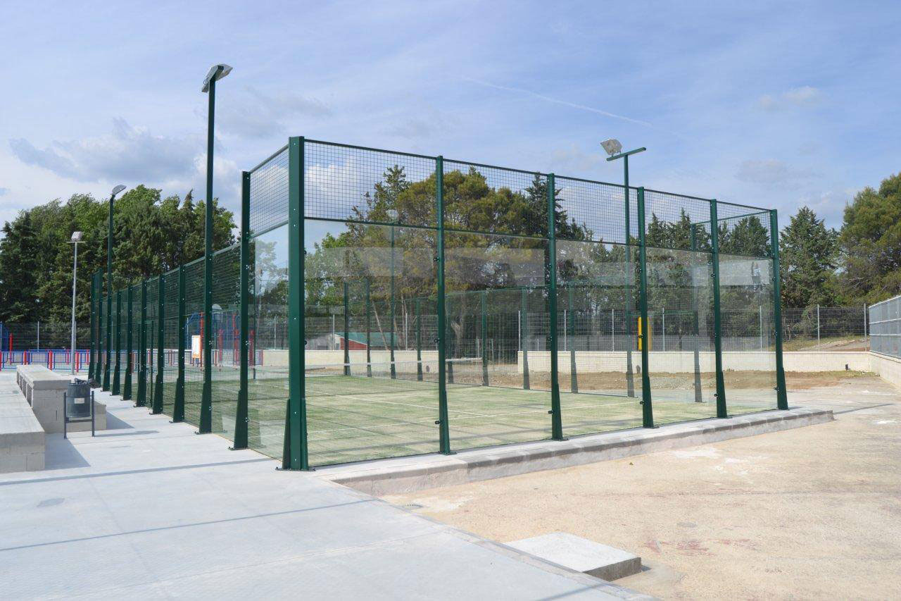 pista de padel